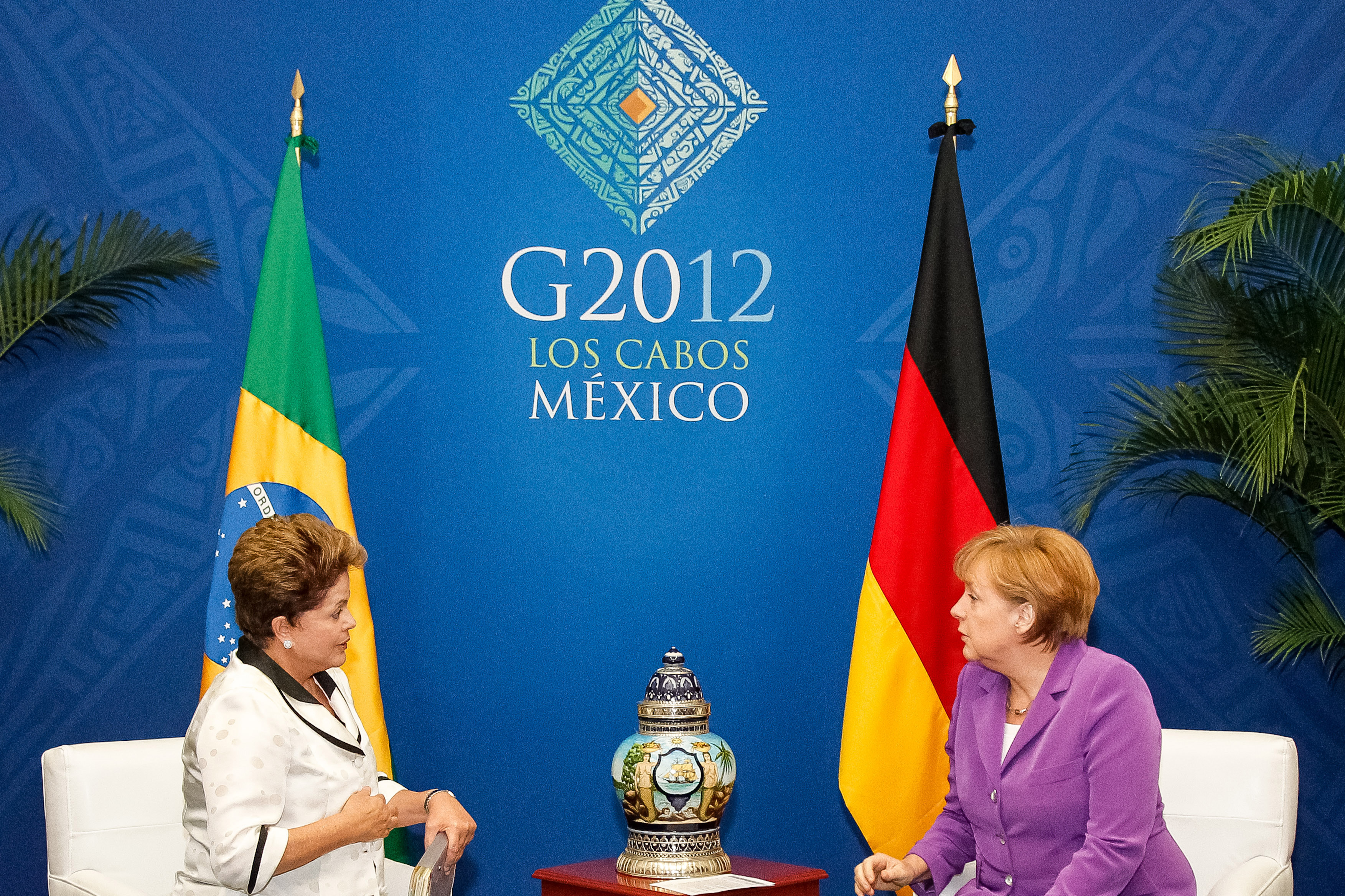 Presidenta Dilma Rousseff durante encontro com a chanceler alemã, Angela Merkel. Los Cabos - México, 19/06/2012 Foto: Roberto Stuckert Filho/PR